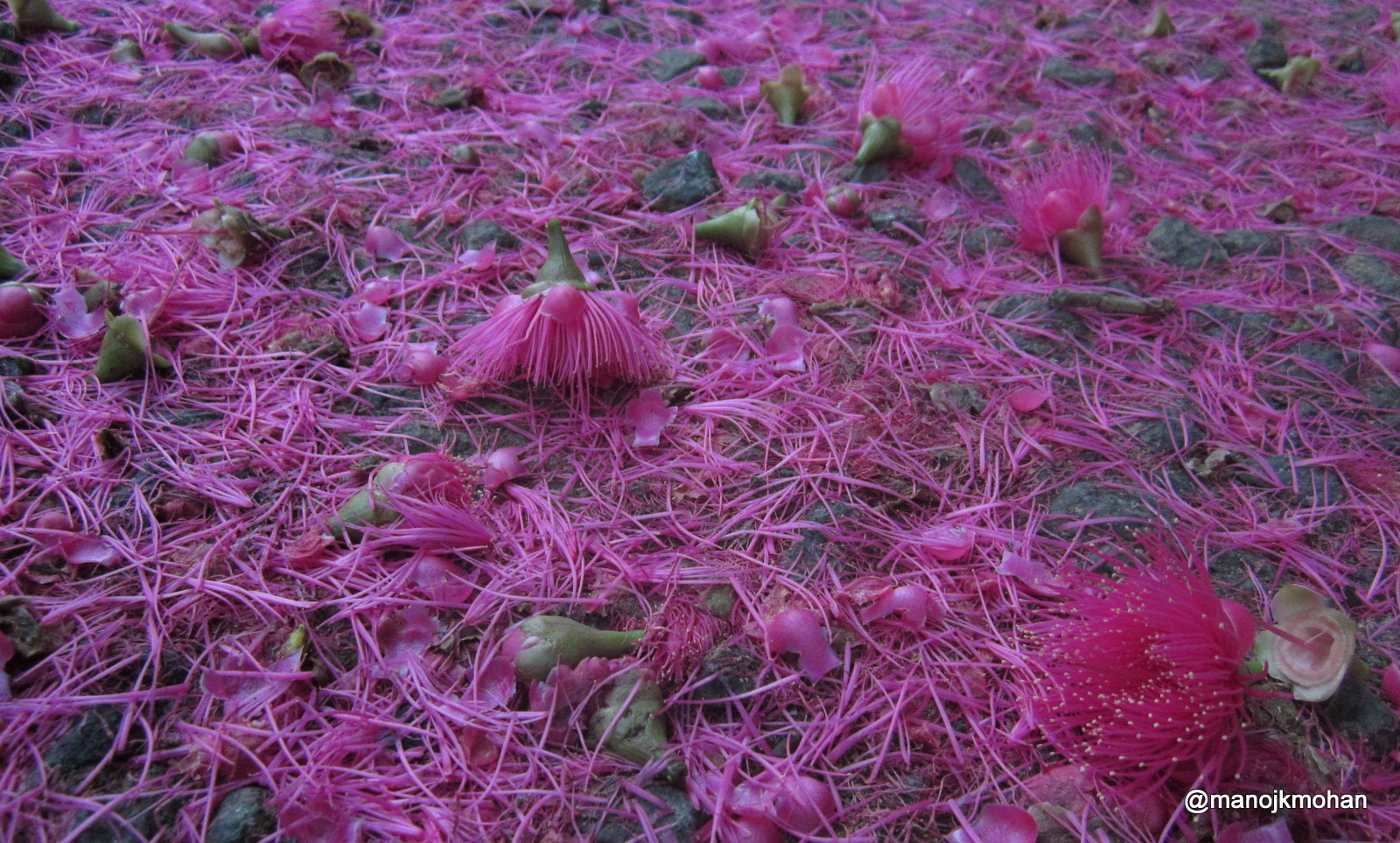 500px provided description